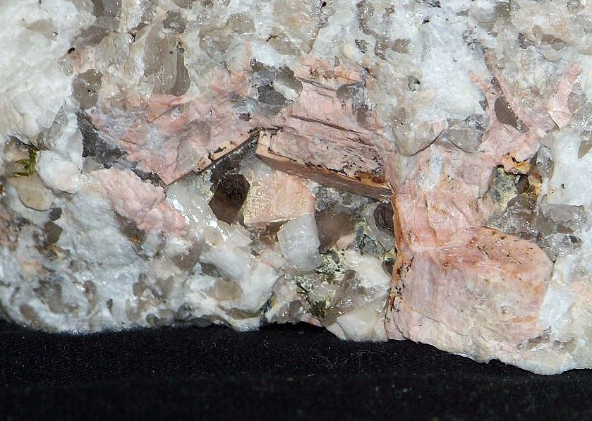 Mineralizacja pegmatytowa (m.in. kwarc dymny, ortoklaz, epidot), kop. Izer Granit, Szklarska Poręba, Polska